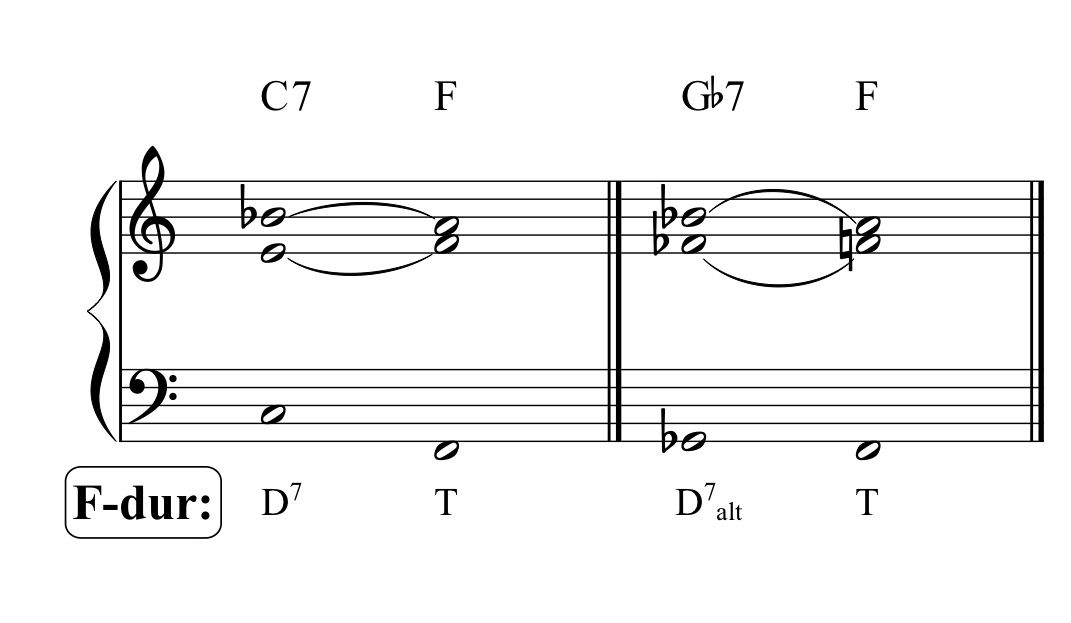 notexempel på gemensamma ledtoner vid tritonussubstitution med ackordanalys och funktionsanalys